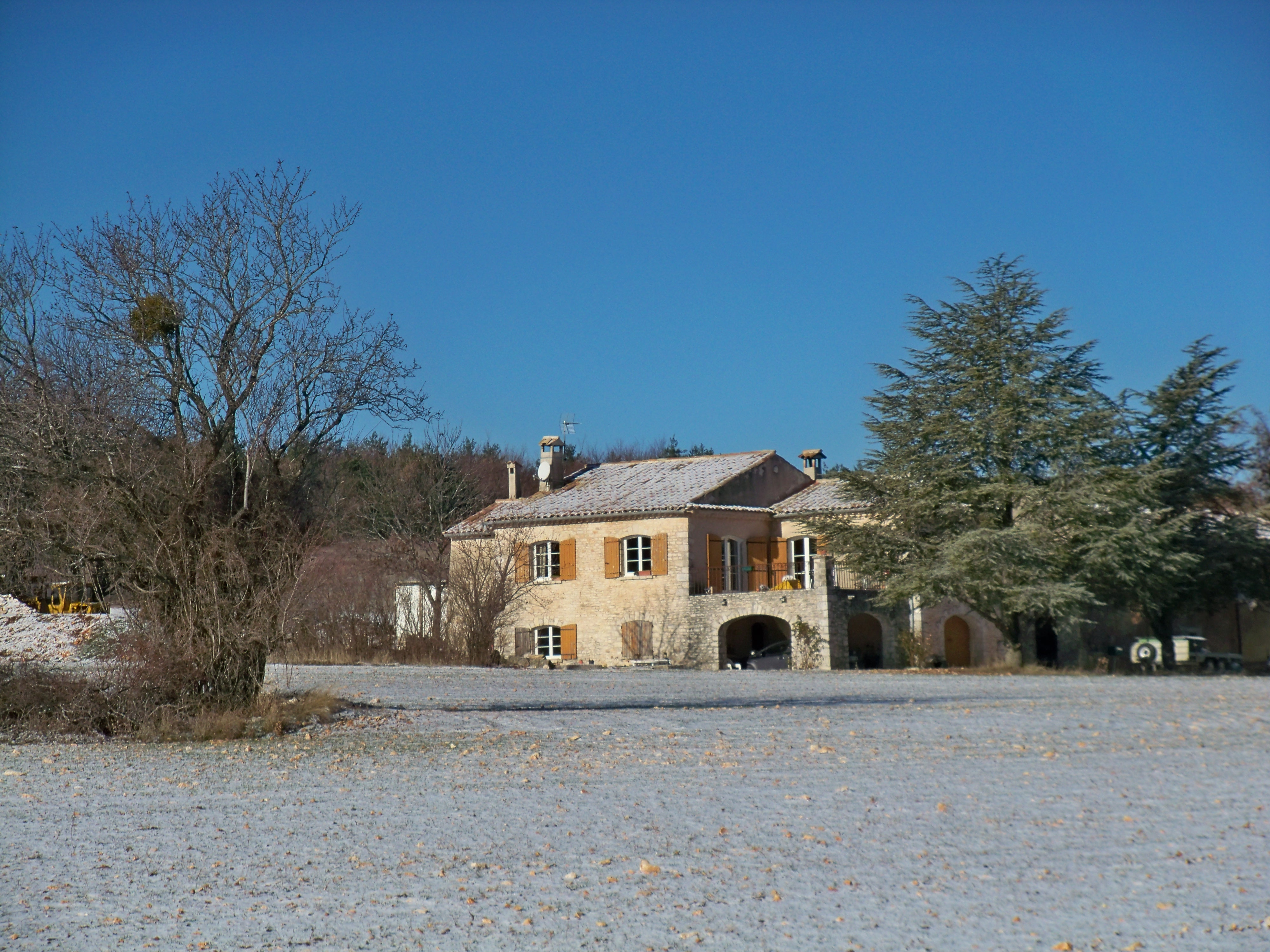 Maison à terre à Saint Christol, Vaucluse, France